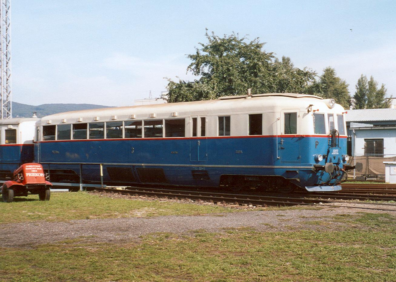 M 274.004 im Museumsdepot Bratislava Vychod